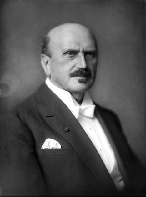 Julius Stoklasa (1857 – 1936 ) český chemik, fyziolog a biolog, rektor ČVUT.